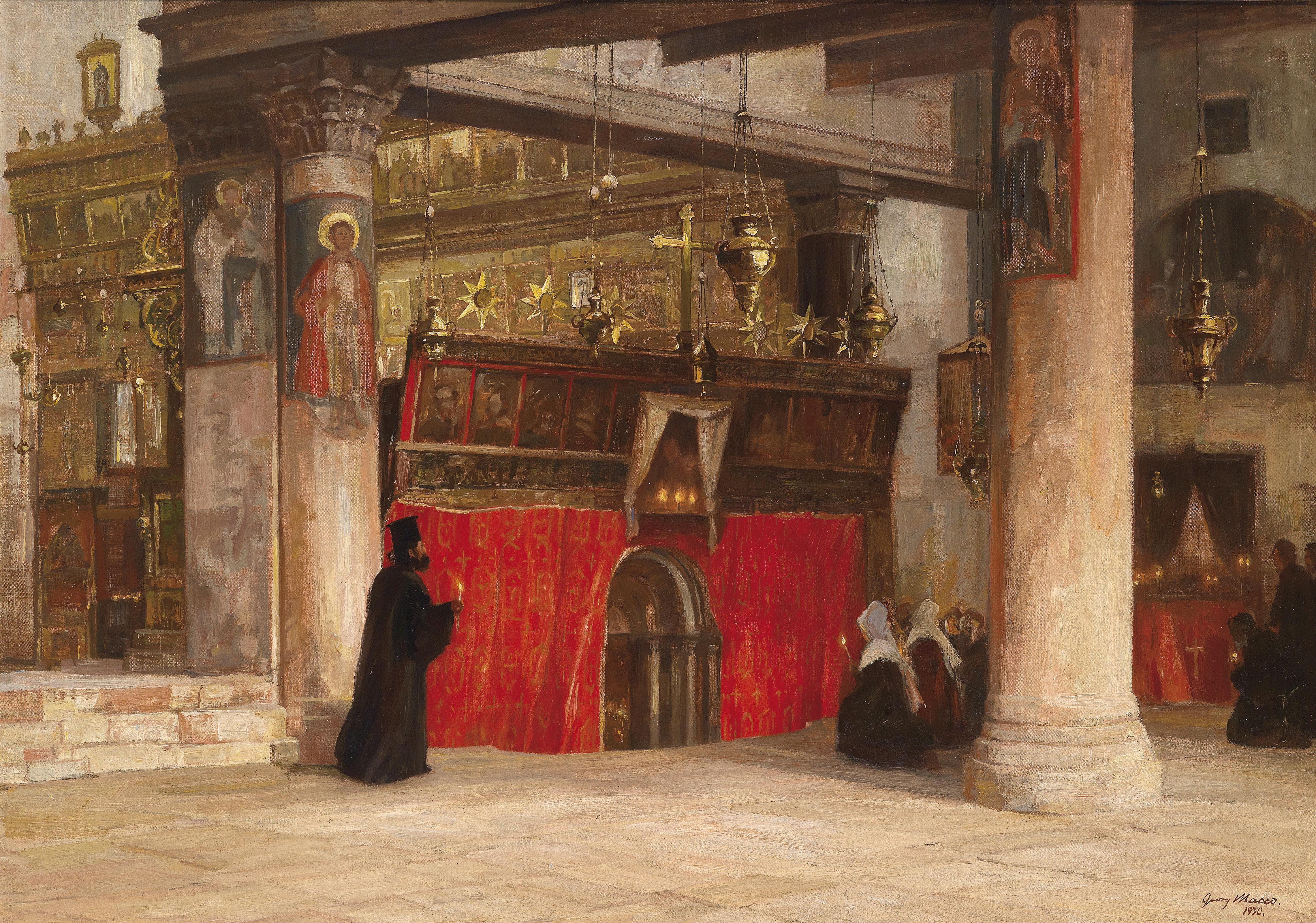 Blick in die Orthodoxe Kirche von Betlehem, signiert und datiert Georg Macco 1930, Öl auf Leinwand, 80 x 112 cm